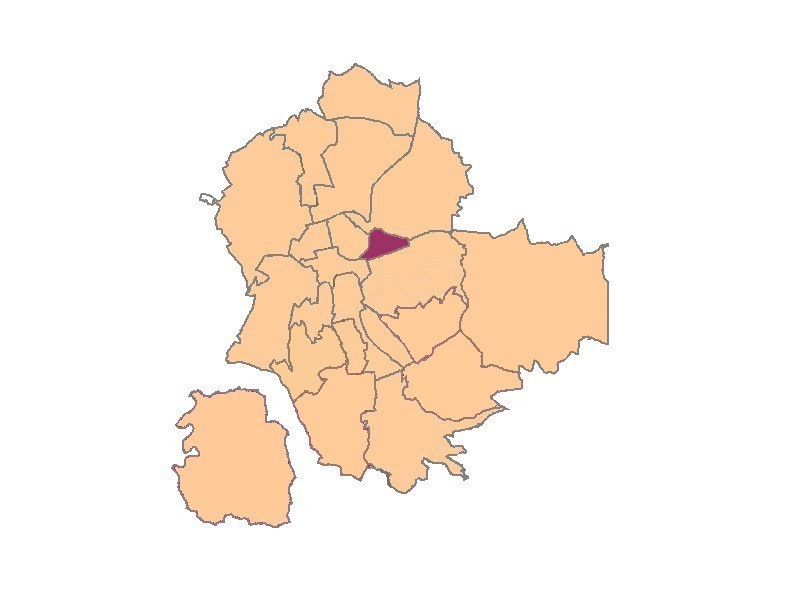 plan de saint-etienne quartier de de Châteaucreux